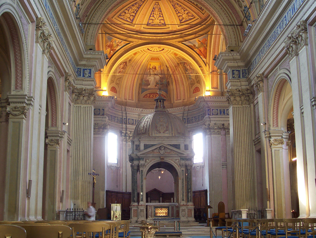 Santi Alessio e Bonifacio, church of Rome